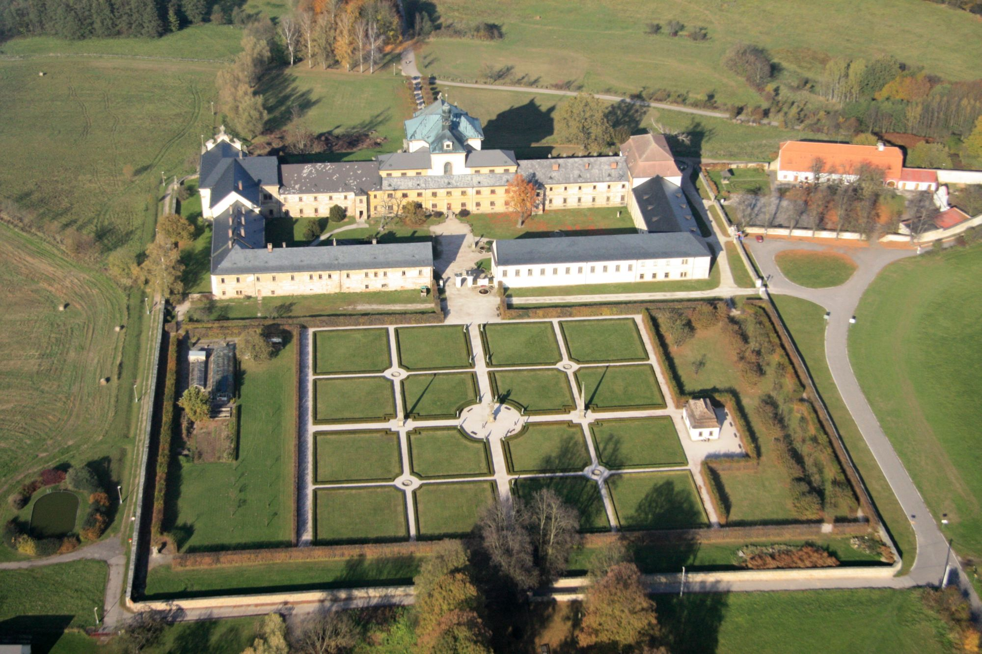 Kuks